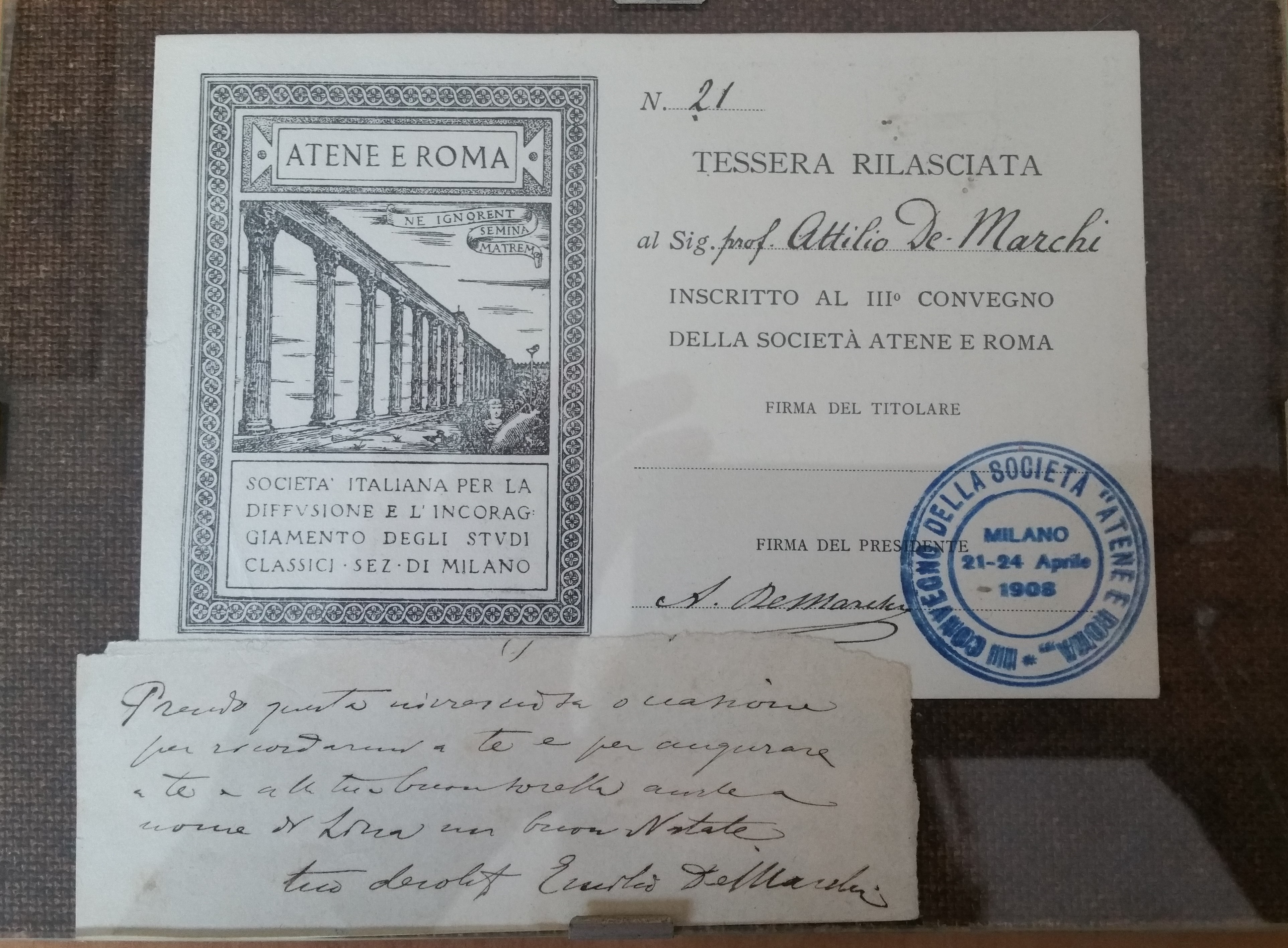 Documento con autografo Emilio De Marchi